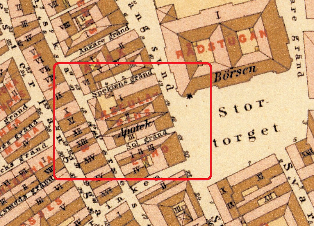 Del av Lundgrens karta över Stockholm år 1885 visande bl.a. Kvarteret Aesculapius med apoteket Korpen